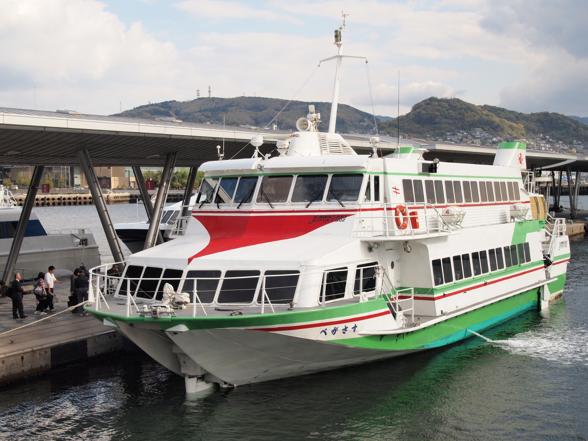 九州商船のジェットフォイル「ペガサス」。長崎港にて。